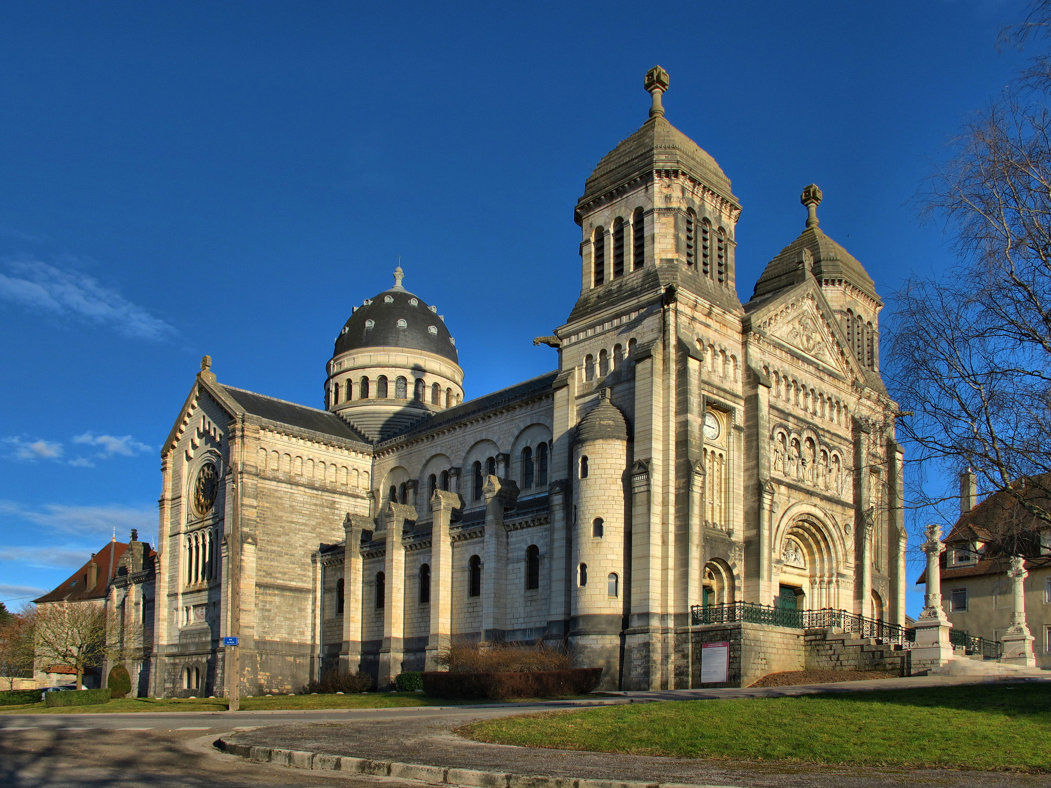 Basilique Saint-Ferjeux .